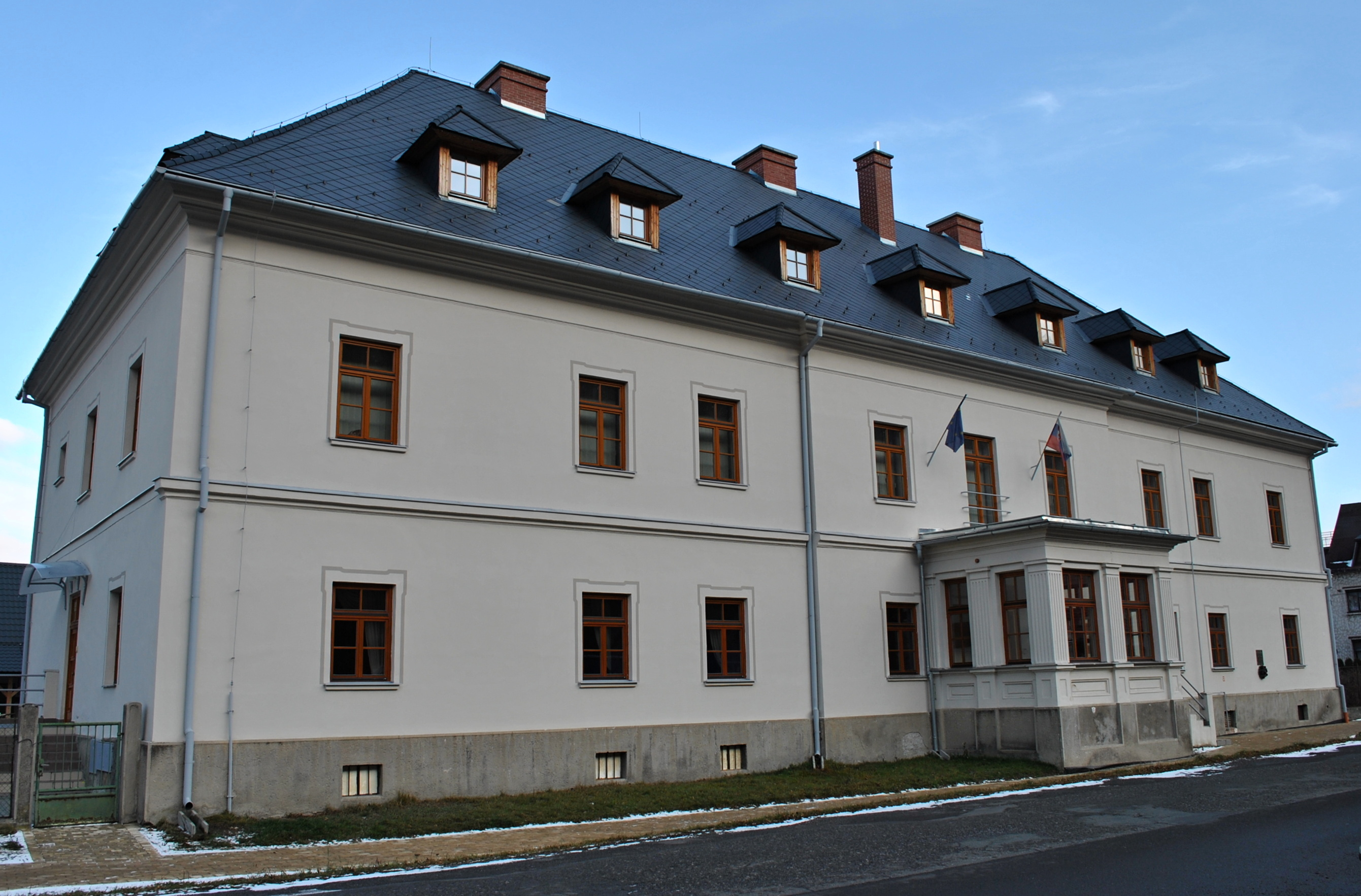 Budova administratívna